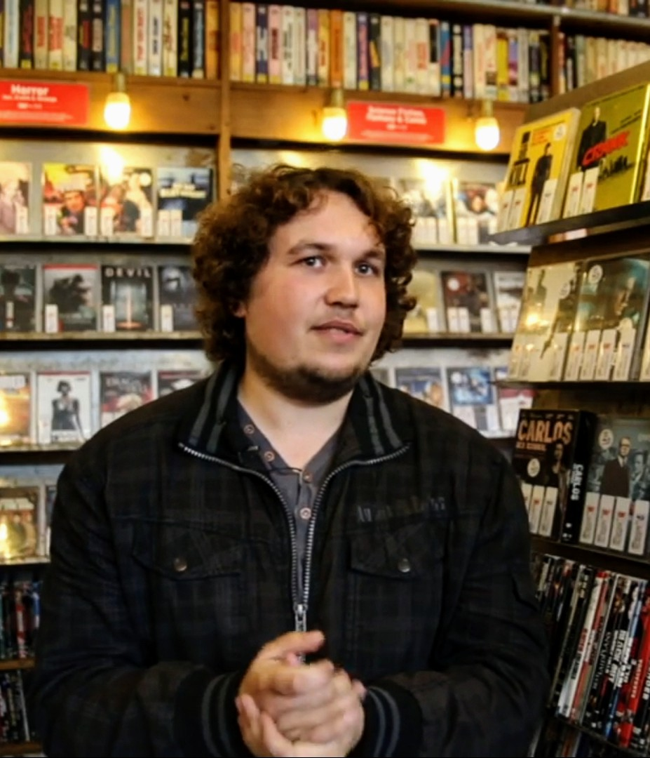 Eigentlich wollte Robert Hofmann Schauspieler werden. Und es begann nicht schlecht: Hofmann spielte Nebenrollen in Produktionen wie "Im Angesichts des Verbrechens", "Oh Boy" oder "SOKO Leipzig". Als die großen Angebote jedoch ausblieben, schwenkte Hofmann um -- fortan spielte er nicht mehr in den Filmen mit, er kritisierte sie. Als Mann vom Fach. Das Ergebnis bis dato: 155.000 Abonnenten, knapp 40 Millionen Abrufe und einer der erfolgreichsten Review-Channels Deutschlands: DVDKritik. Vom Darsteller zum Kritiker -- oder die Geschichte hinter dem Tweet: "Stehe bei MediaMarkt und frage den Verkäufer nach nem Film. Der antwortet nur ganz trocken: ICK FAND DEINE KRITIK ZU "THE TALL MAN" COOL! :)" Roberts Tweets gibt's unter Mehr Folgen gibt's unter oder hier im Channel